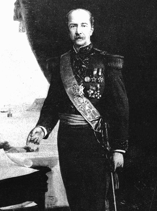 ViceAlmirante y General Patricio Lynch